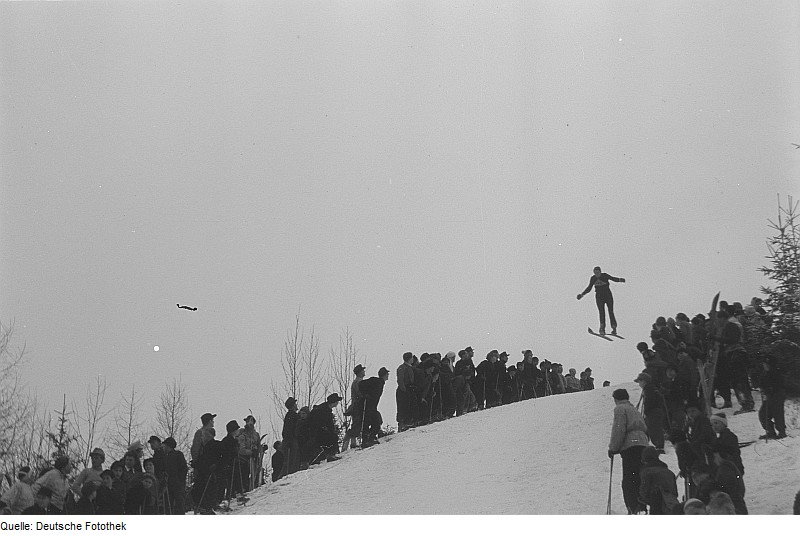 Original image description from the Deutsche Fotothek Skispringer